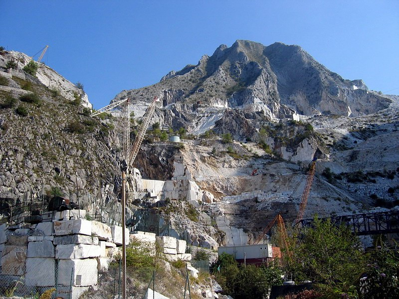 Carrara, Toscana, Italia